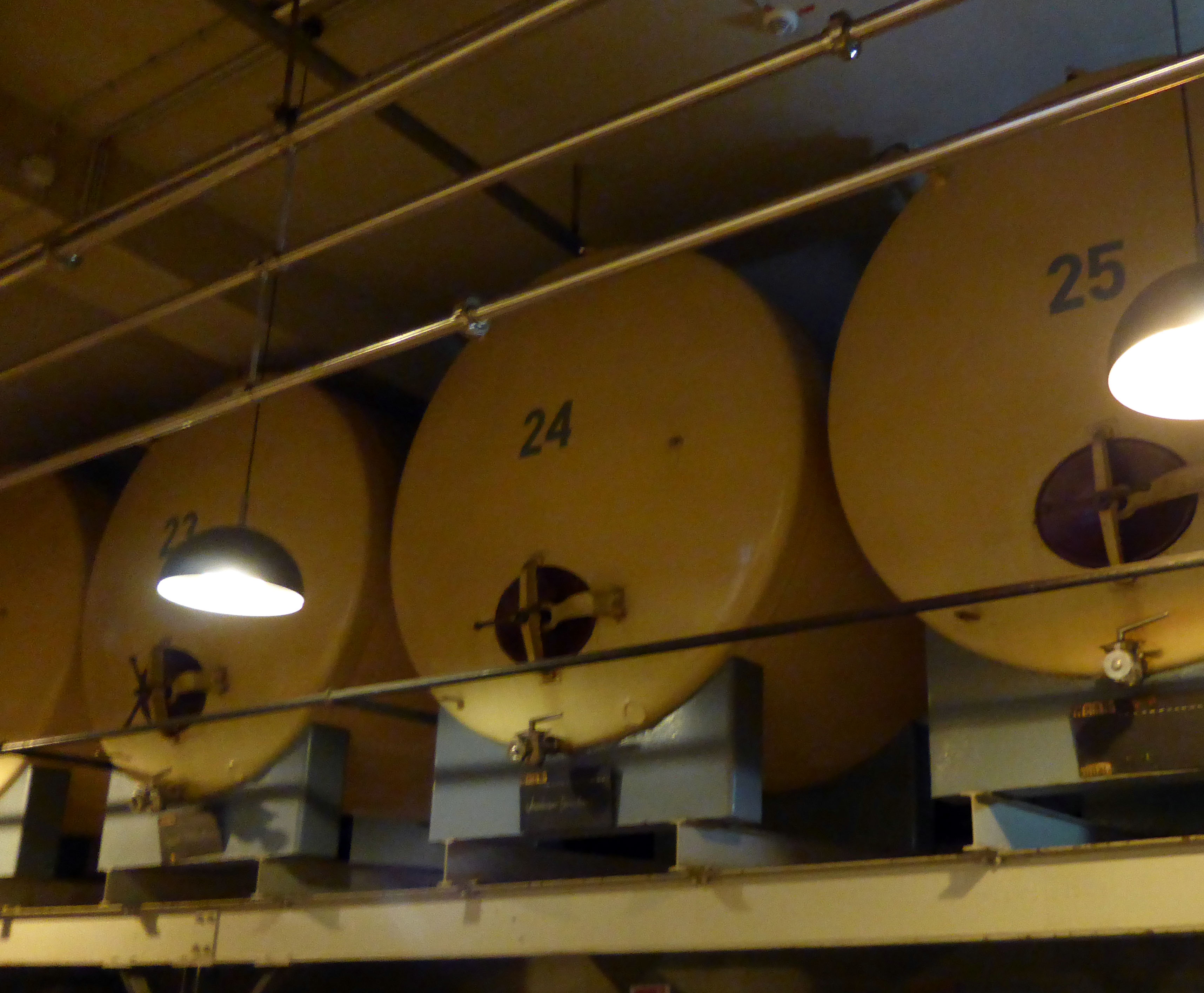 Kölner Weinkeller